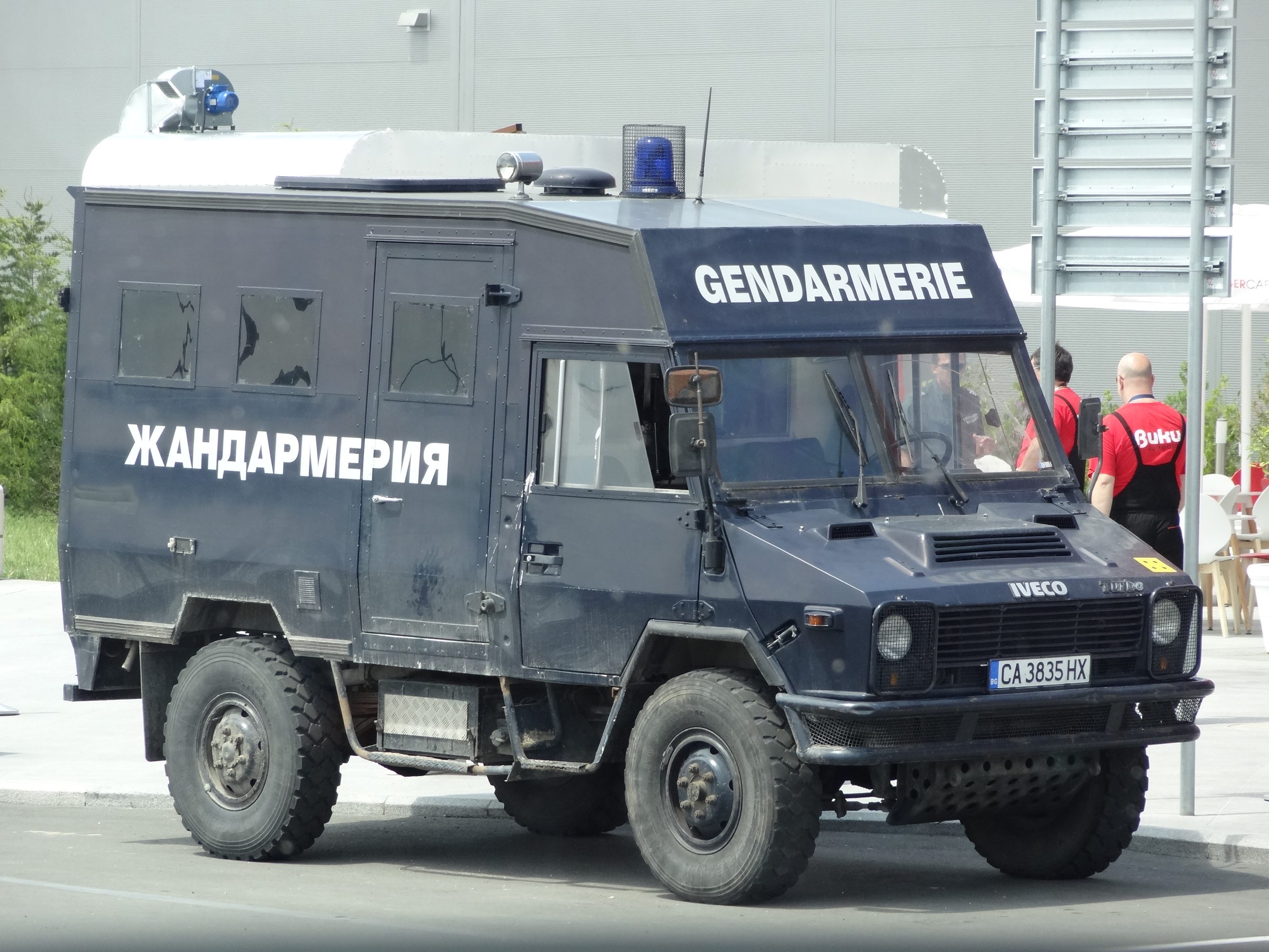 National Gendarmerie Service Bulgaria